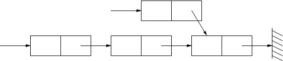 Deuxième étape de l'ajout d'un élément dans une liste chaînée. Dessin réalisé sous xfig par moi même. Licensing Catégorie:Schémas